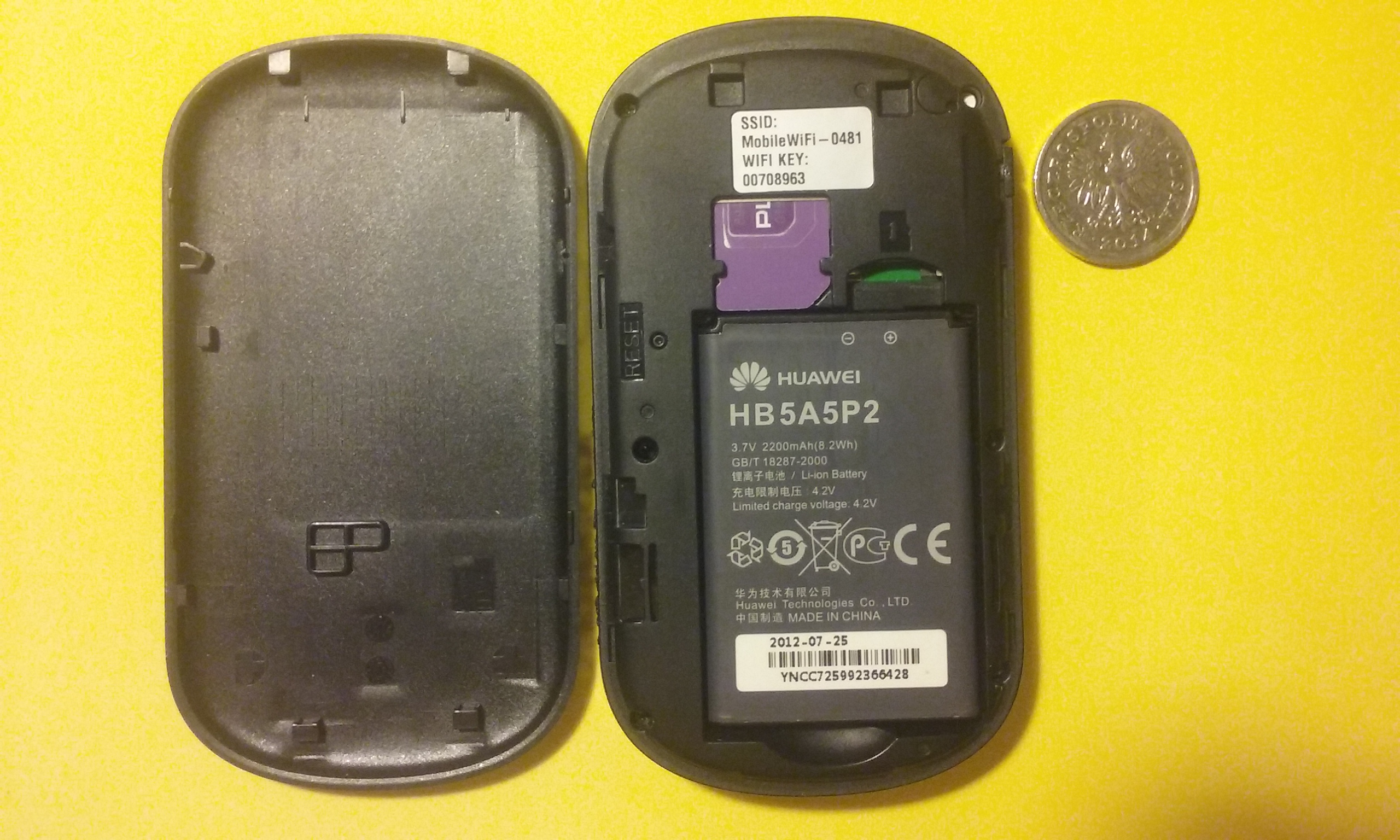 Huawei E587u-2 z widoczną baterią i slotami - karty sim (zajęta przez kartę polskiej sieci Play), orz slotem kart pamieci microSD